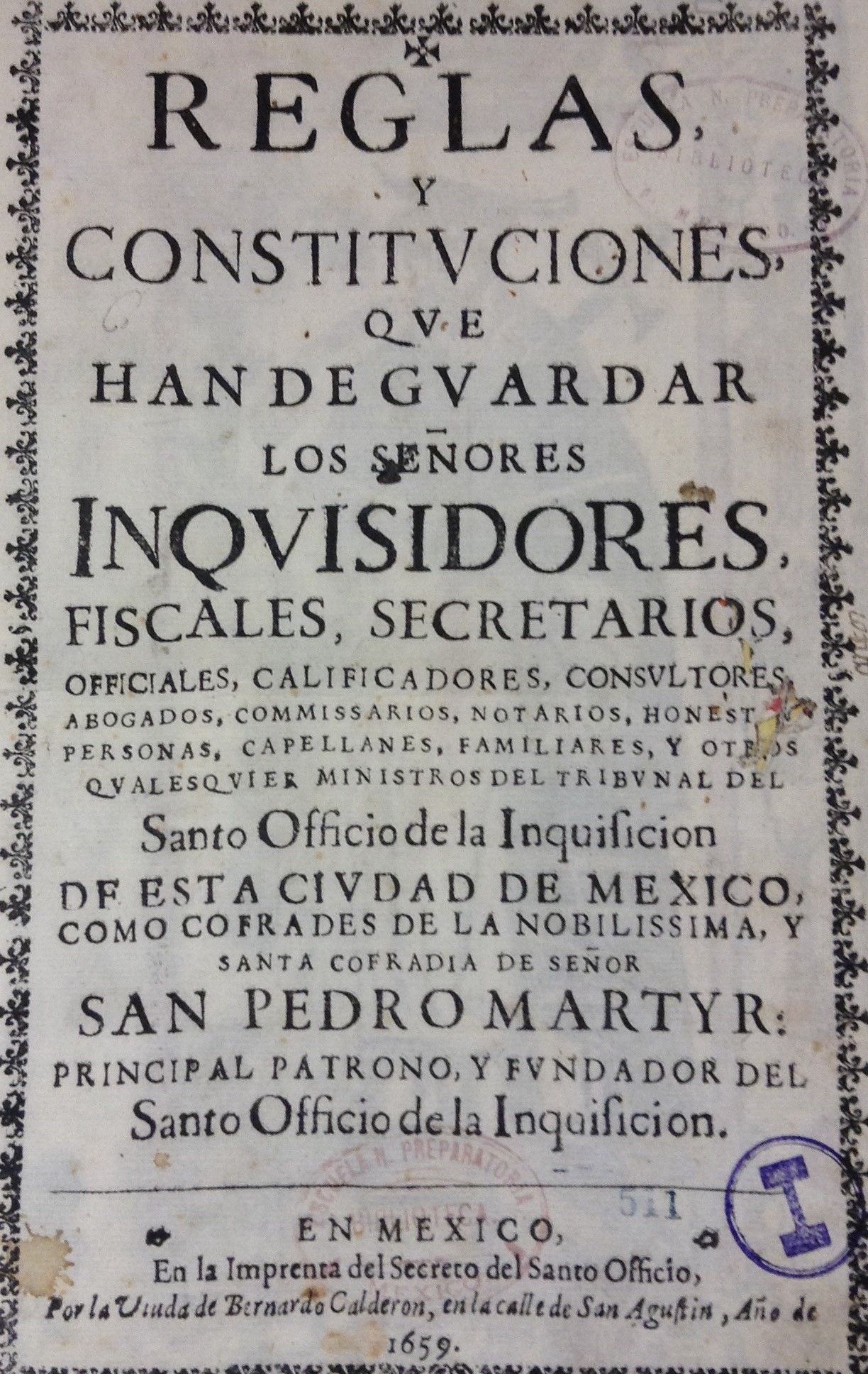 Portada del libro Reglas y Constituciones que han de guardar los impresores del año 1659 impreso por la viuda de Bernardo Calderón